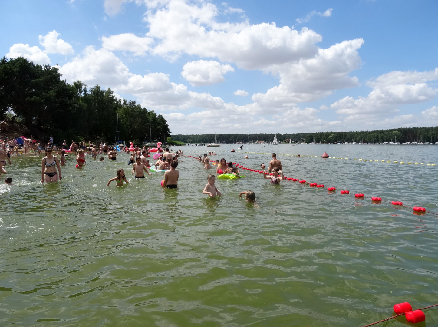 Plaża w Pieczyskach nad Zalewem Koronowskim